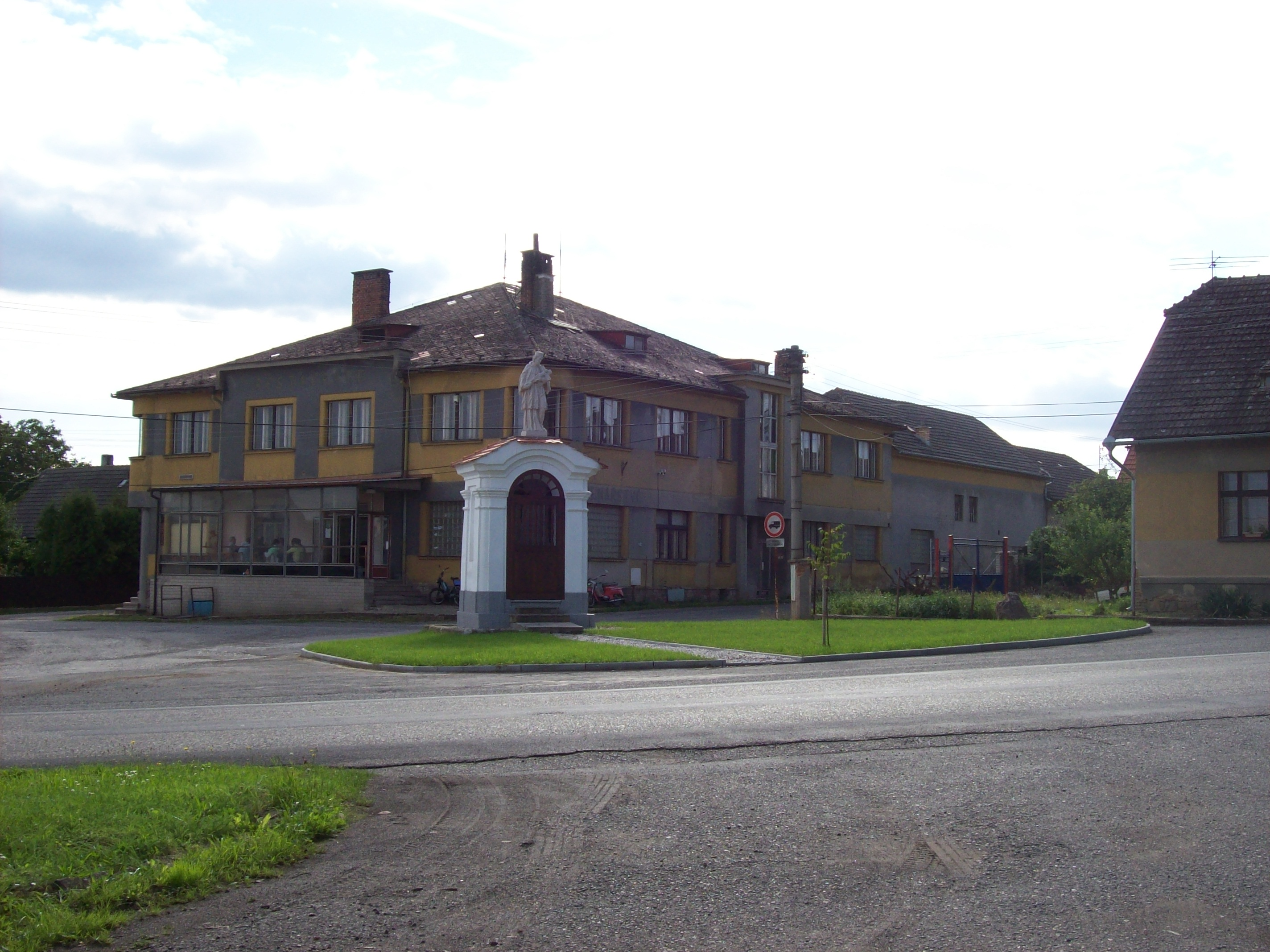 Drozdov (BE)